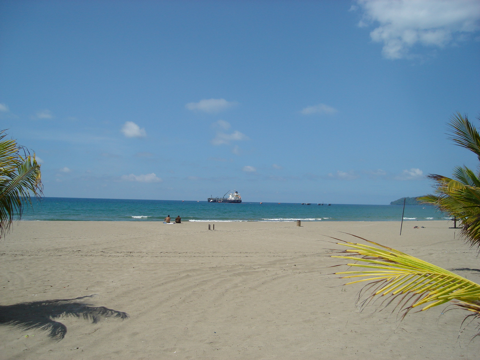 Barco en Tela